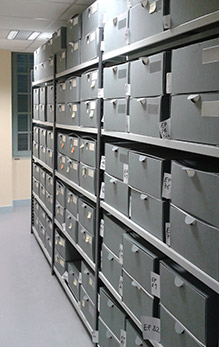 Réserve des herbiers, Muséum des sciences naturelles d'Angers (Maine-et-Loire, France), 2017.